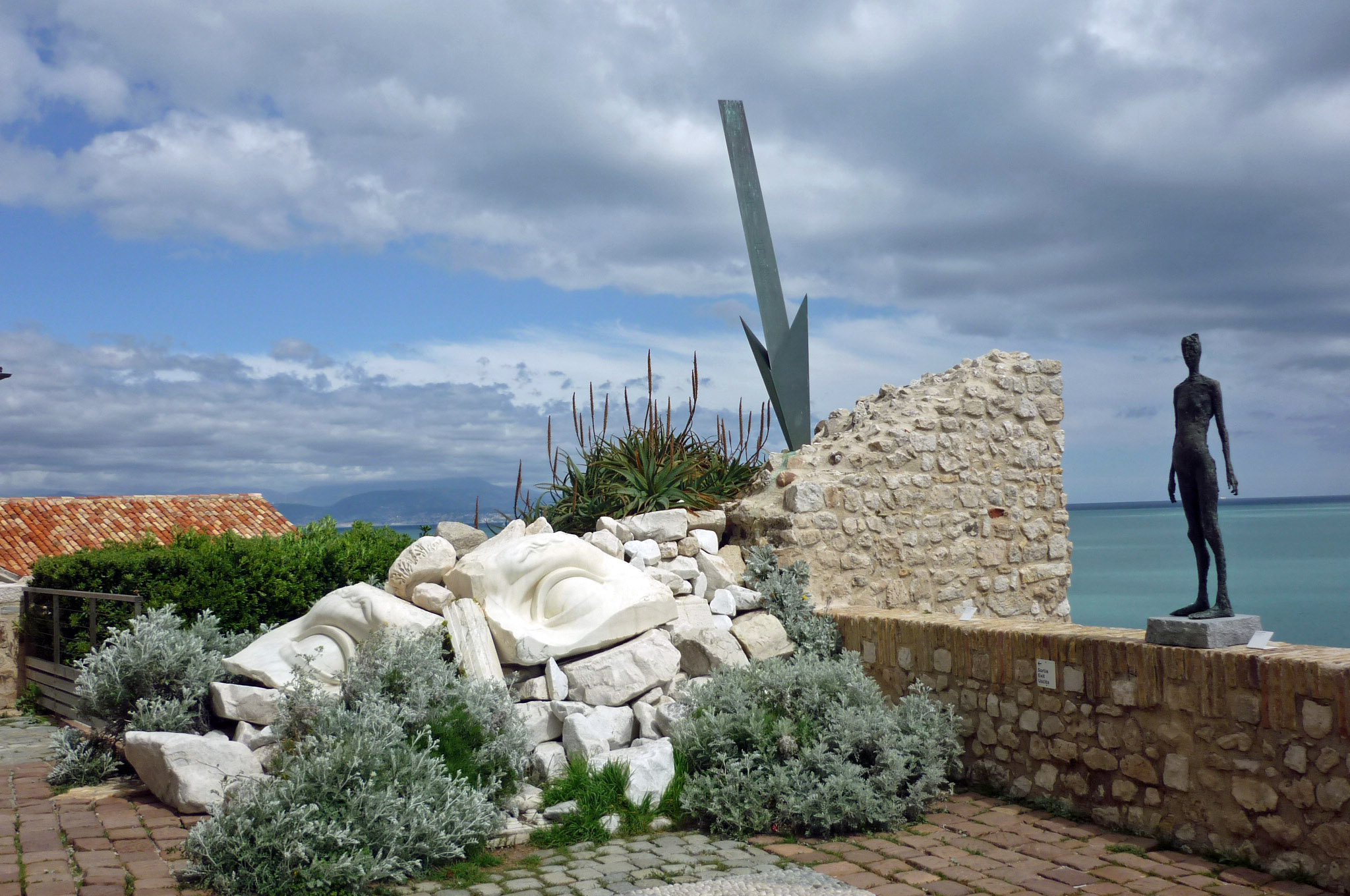 Château Grimaldi in Antibes (auf der Terrasse), mit Skulptur von Germaine Richier (1902–1959)